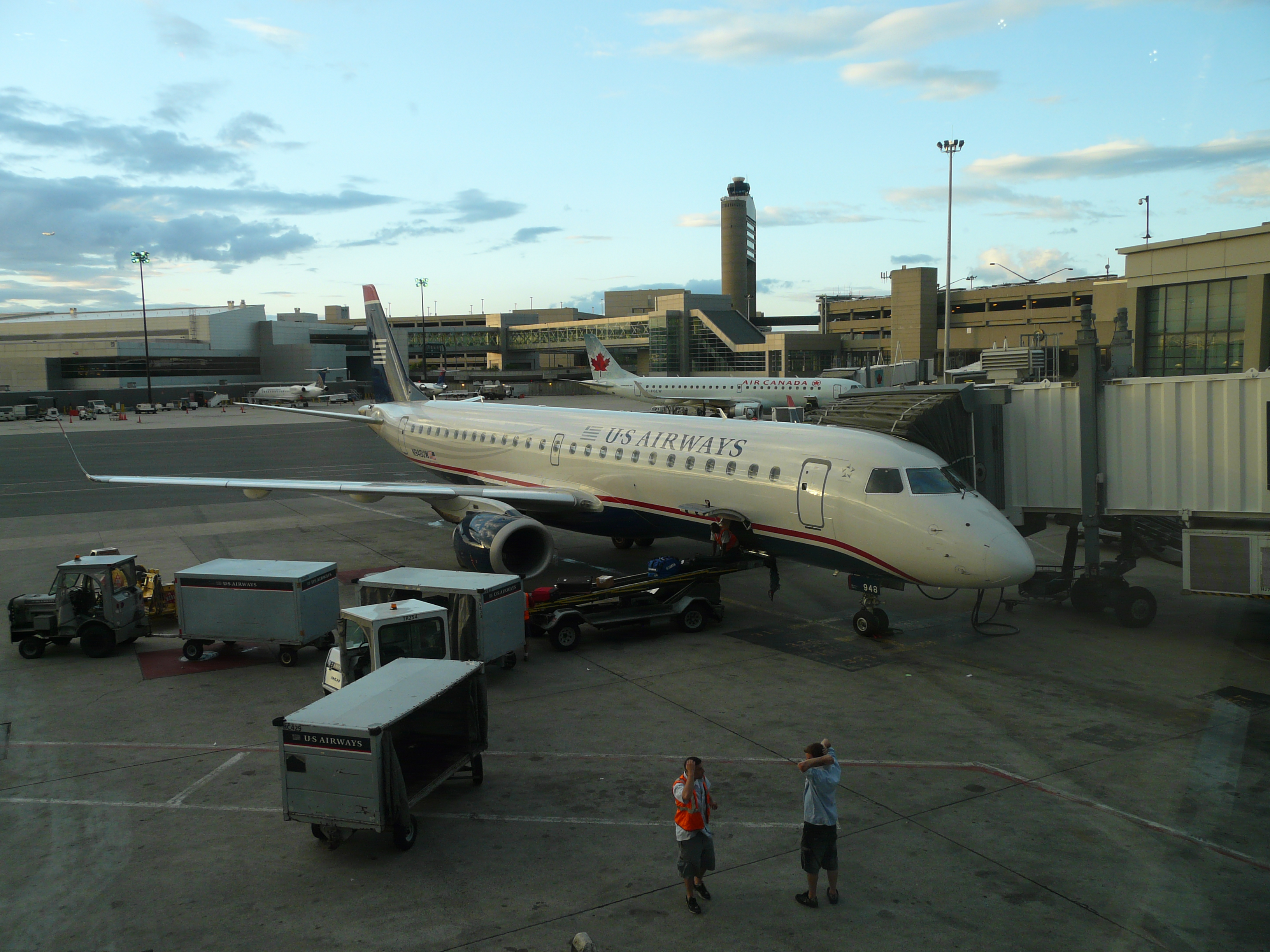 Boston